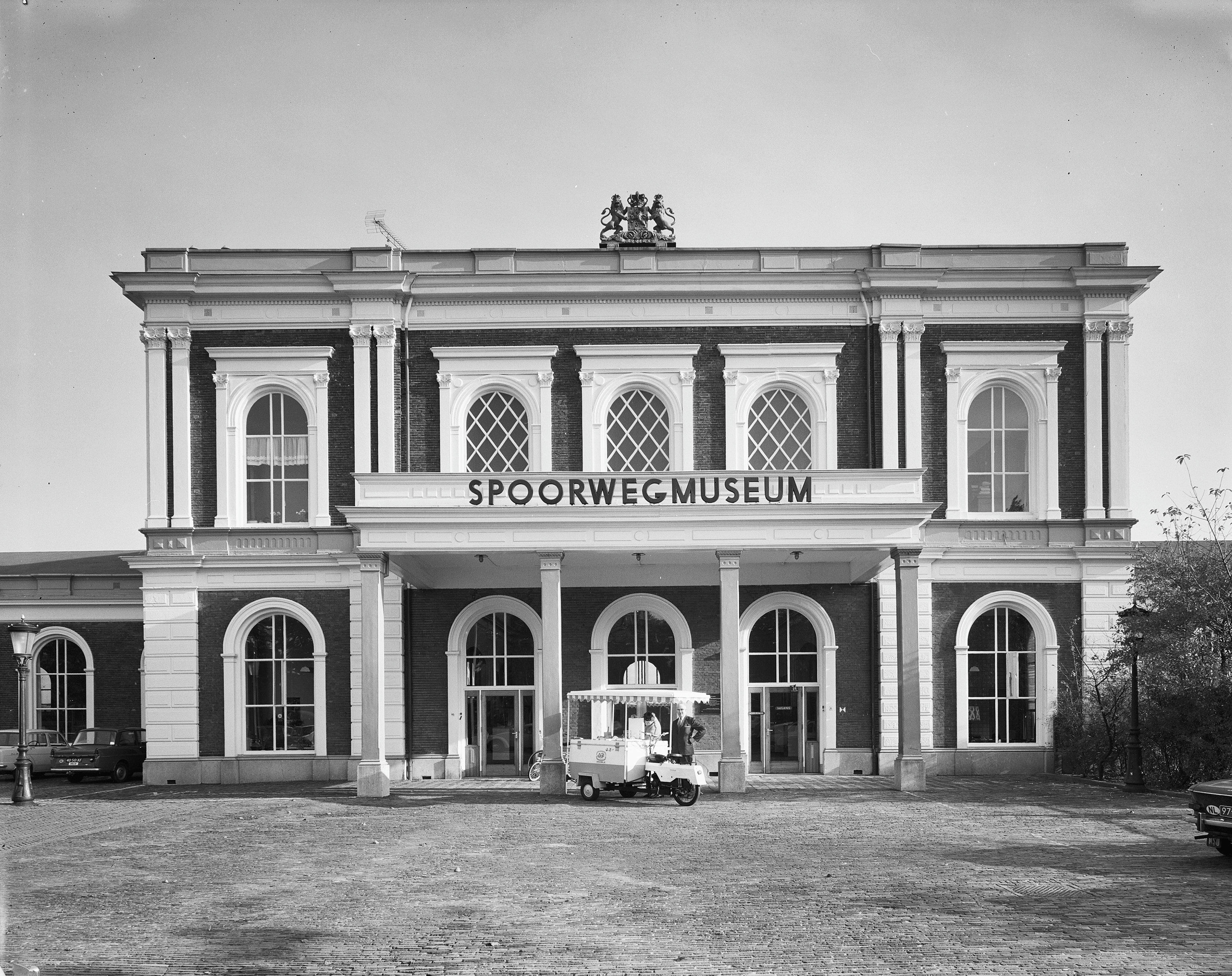 Station Maliebaan: voorgevel